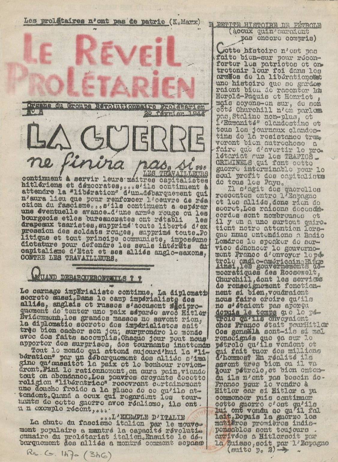 Journal publié par "Le Groupe révolutionnaire prolétarien", fondé en 1942, est une organisation révolutionnaire clandestine antifasciste, active en France pendant la Seconde Guerre mondiale